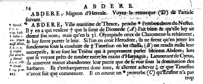 Extrait de Pierre Bayle, Dictionnaire historique et critique, 1697. Source:Gallica